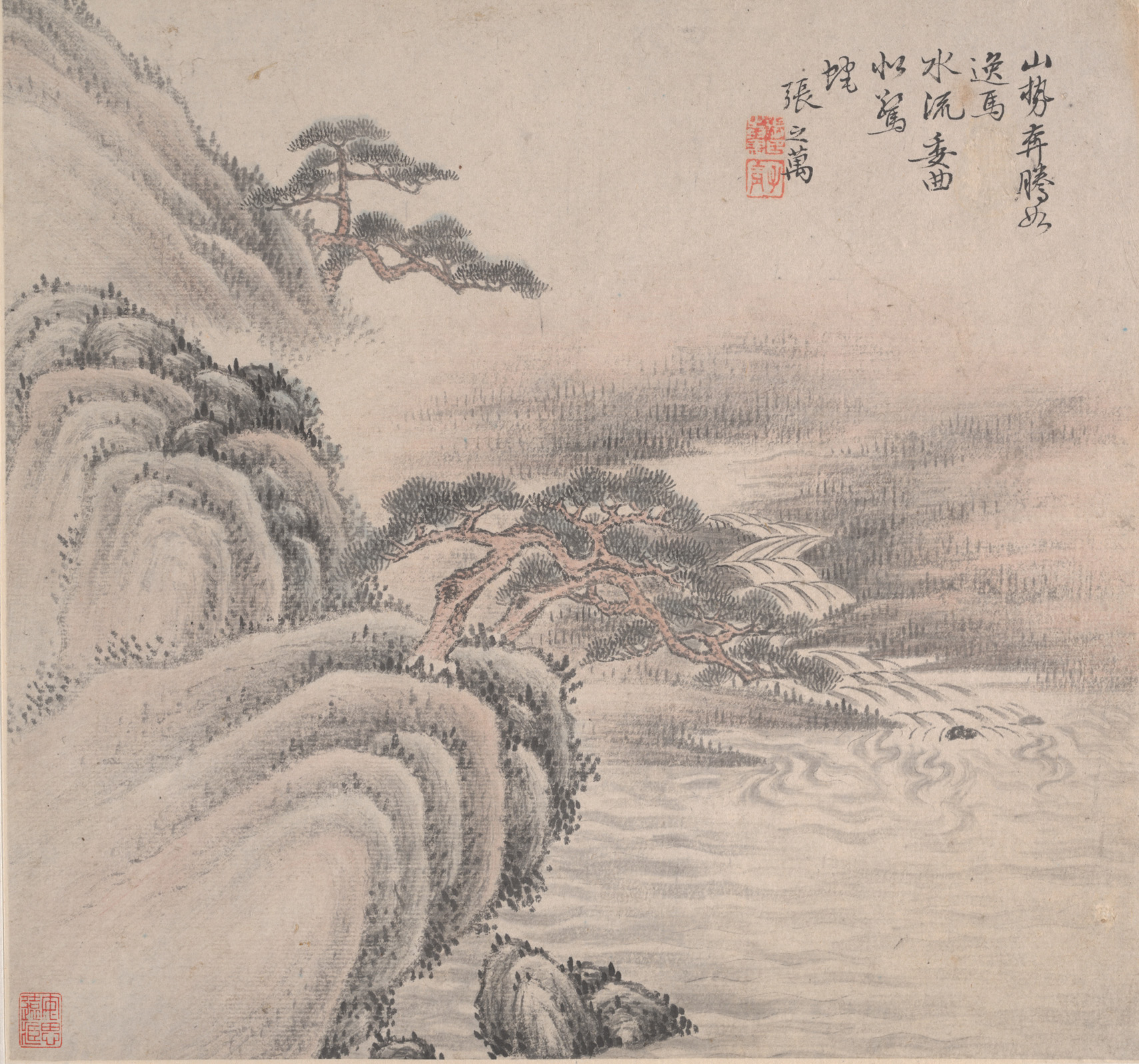 China; Album; Paintings